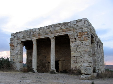 elad moseleom